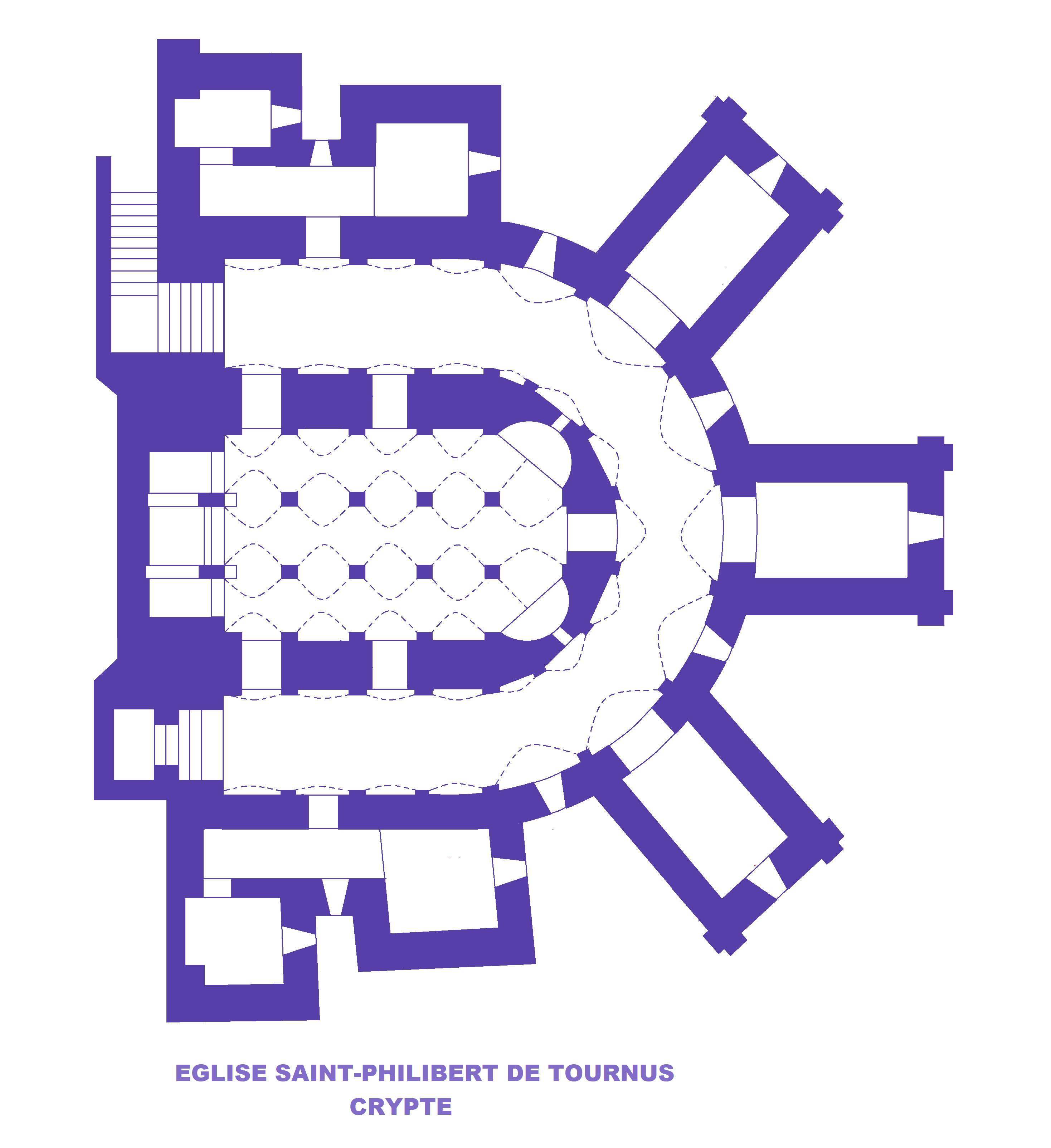 Eglise Saint-Philibert de Tournus, Crypte